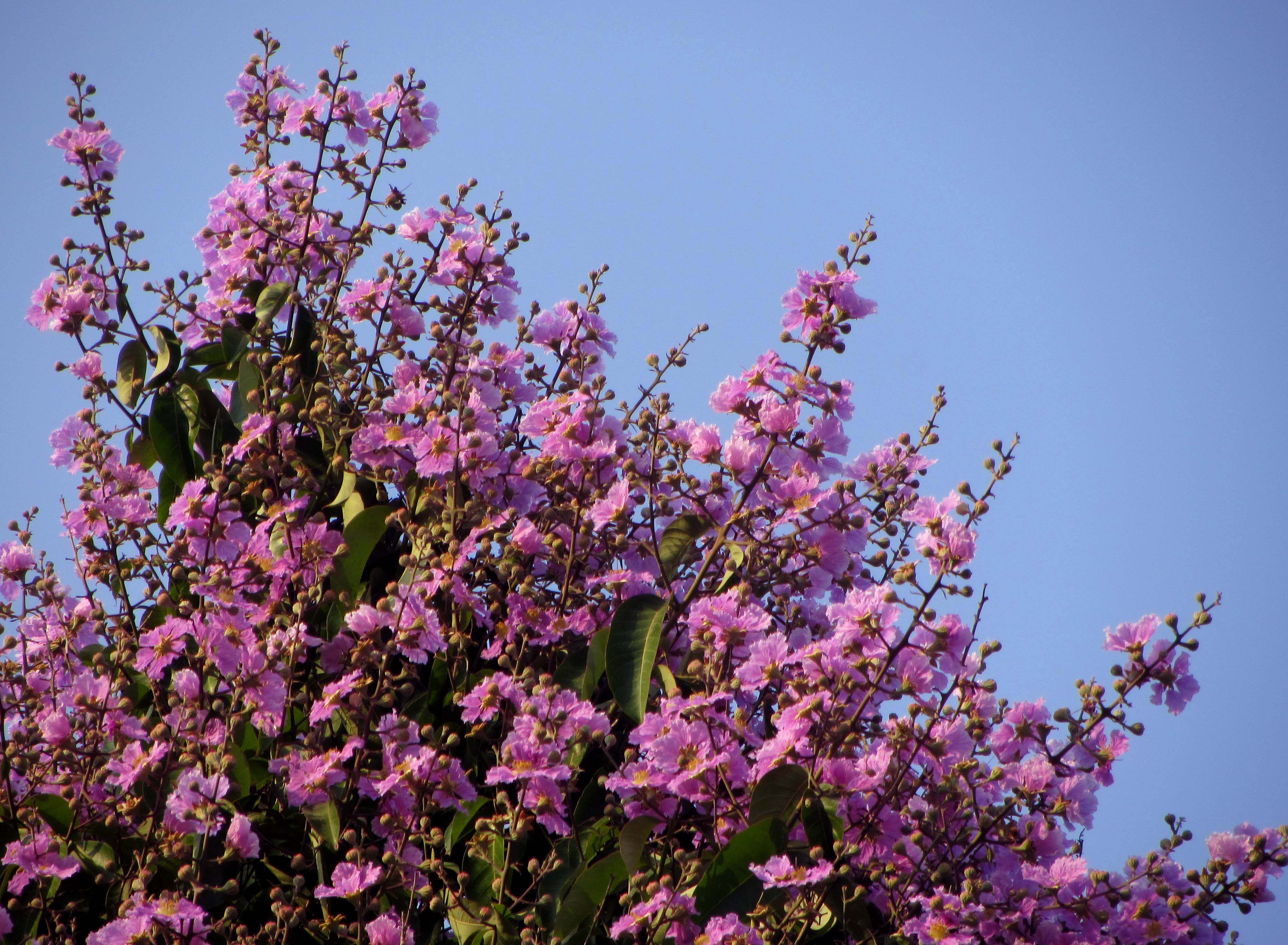 Lagerstroemia speciosa (Ejar in Assamese)